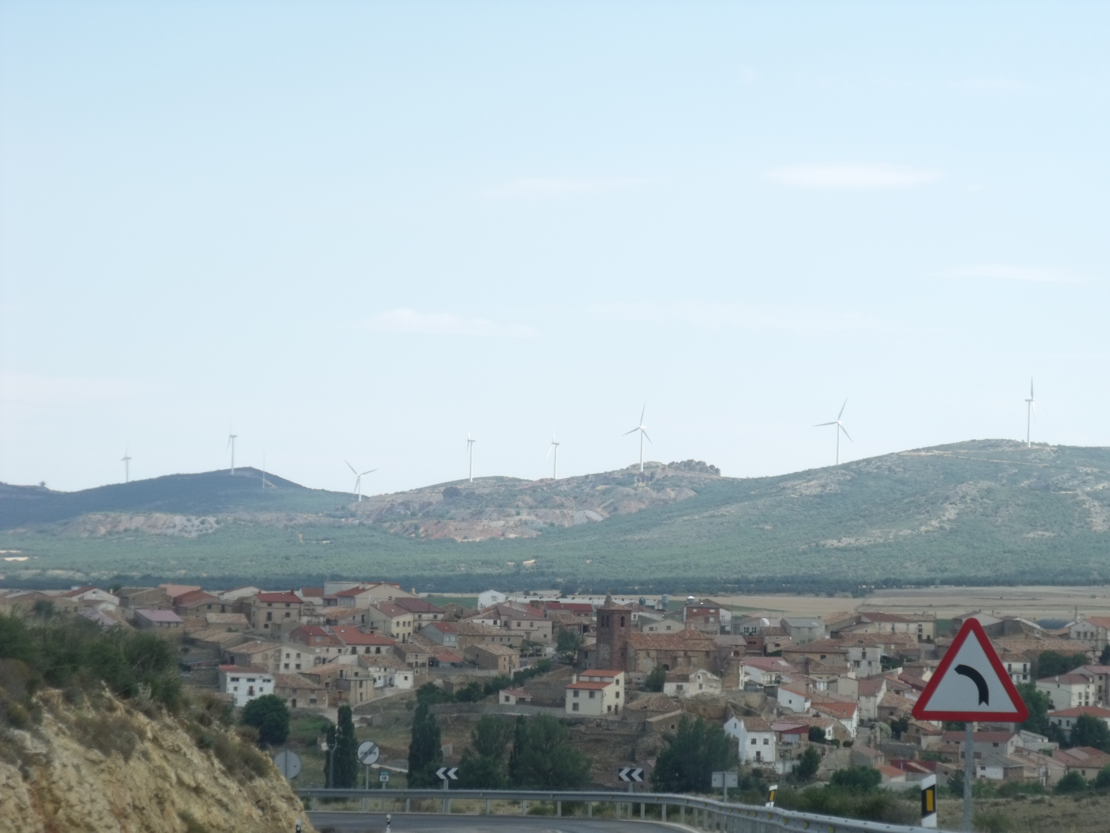 Vista general del pueblo